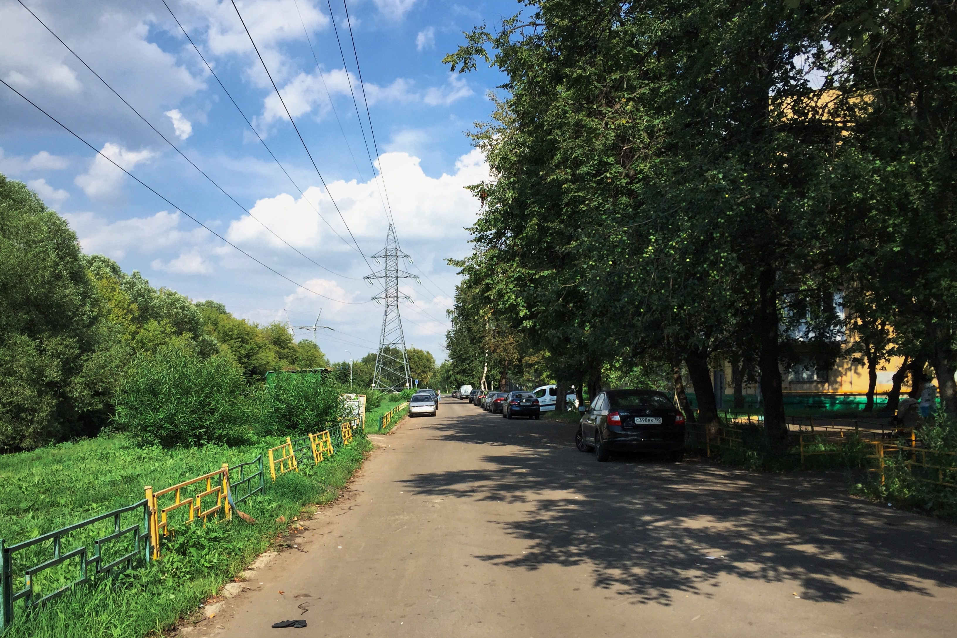 Лихоборская набережная Moscow in 2016; Москва в 2016